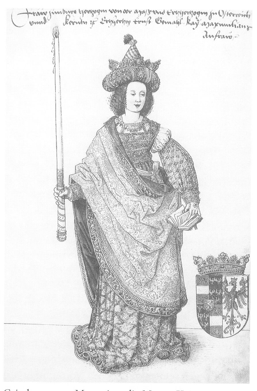 Czimburga von Masowien, die Mutter Kaiser Friedrichs III. Aus dem Figurenkodex für das Grabmal Maximilians I.